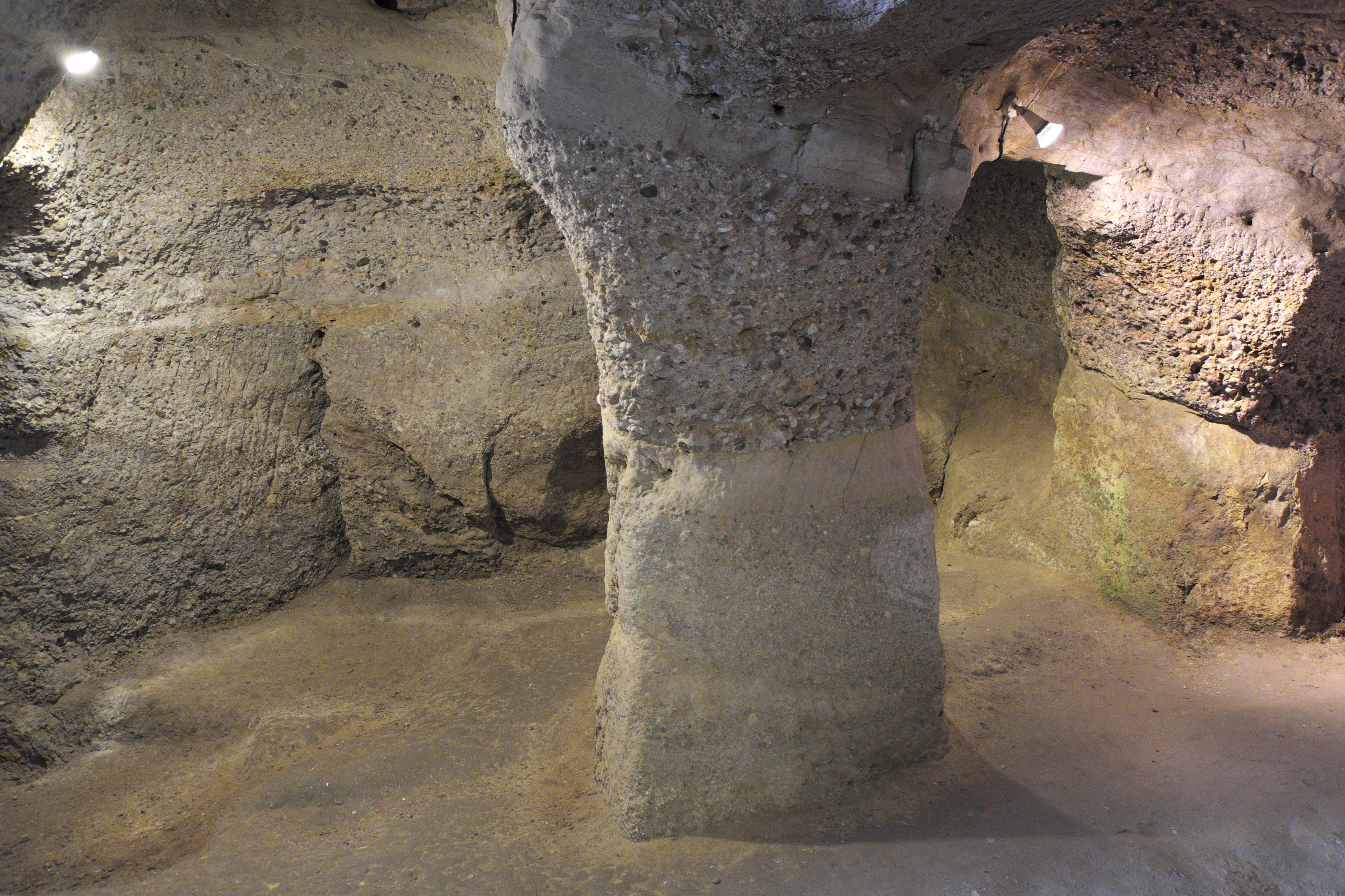 Ehemalige Abtei Saint-Hilaire in Saint-Hilaire im Département Aude (Region Languedoc-Roussillon/Frankreich), Vorratsspeicher